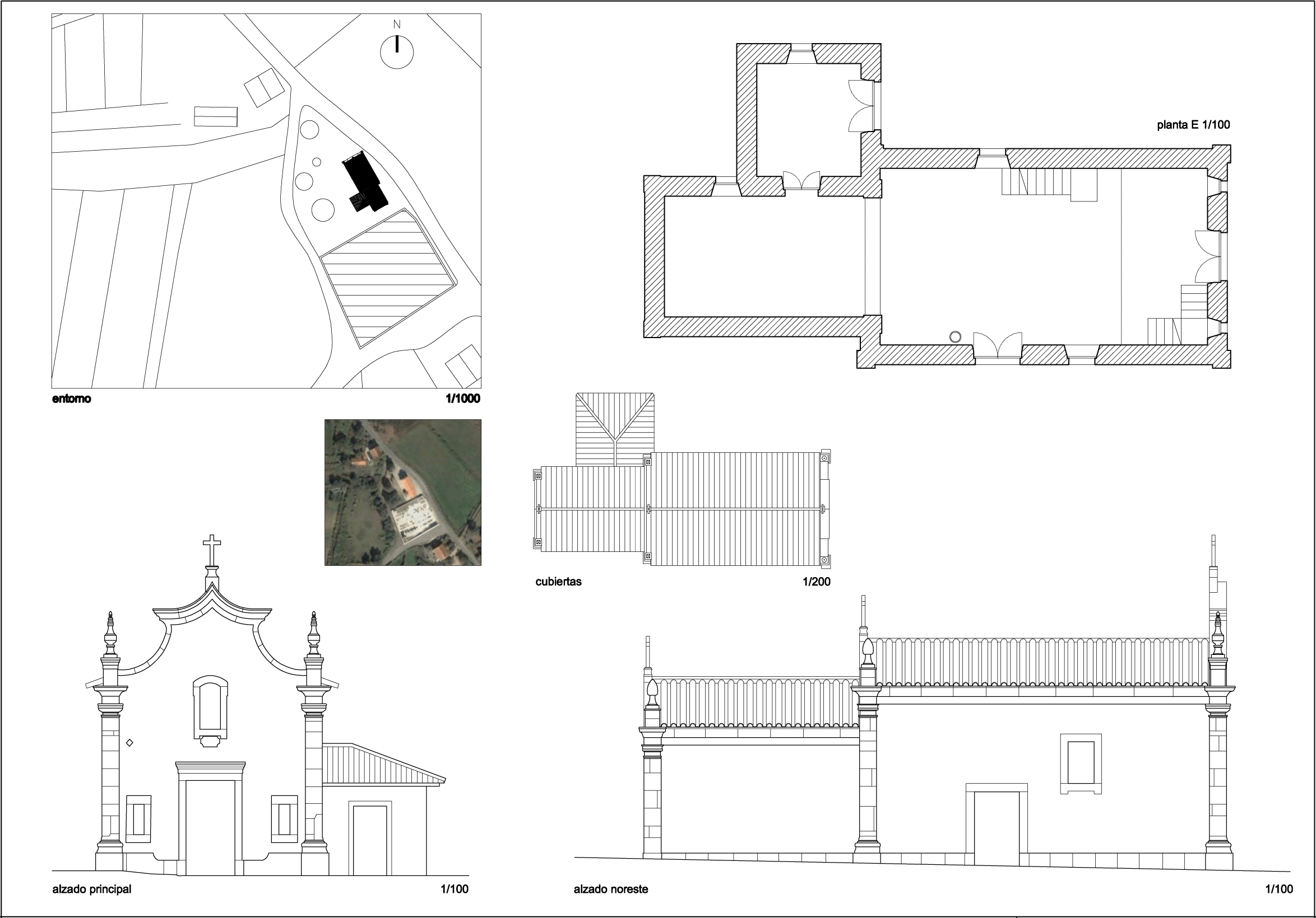 levantamiento a escala de plantas y alzados de la capilla del "Senhor da boa morte"